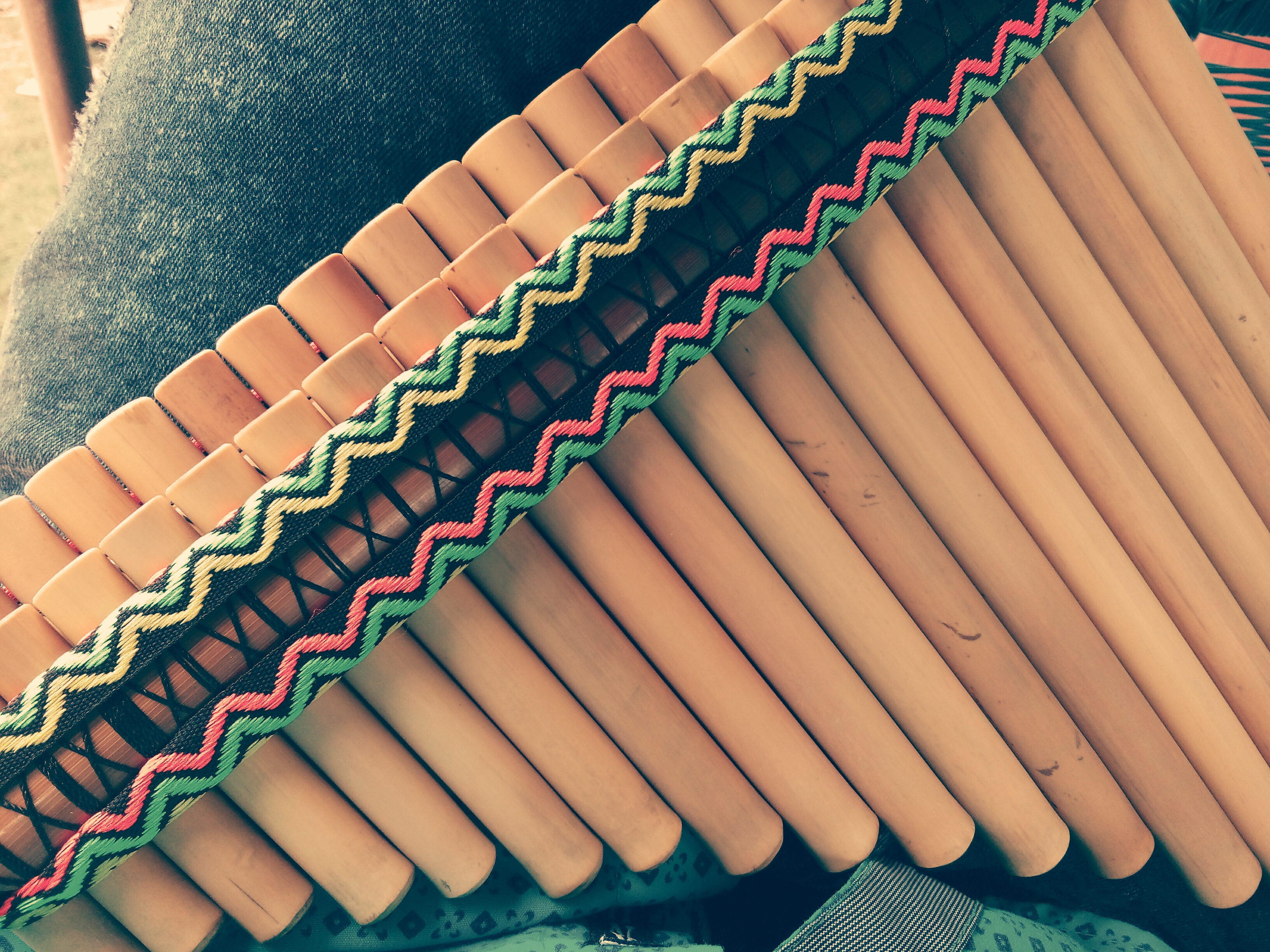 Zampoña cromatica de 21 X 20